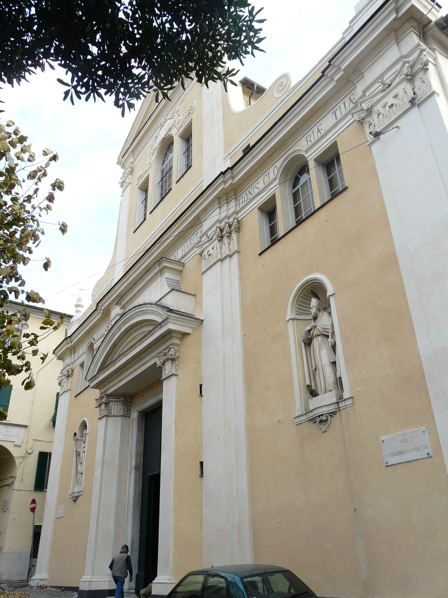 Chiesa dei Santi Nicolò ed Erasmo, Genova Voltri, Liguria, Italia